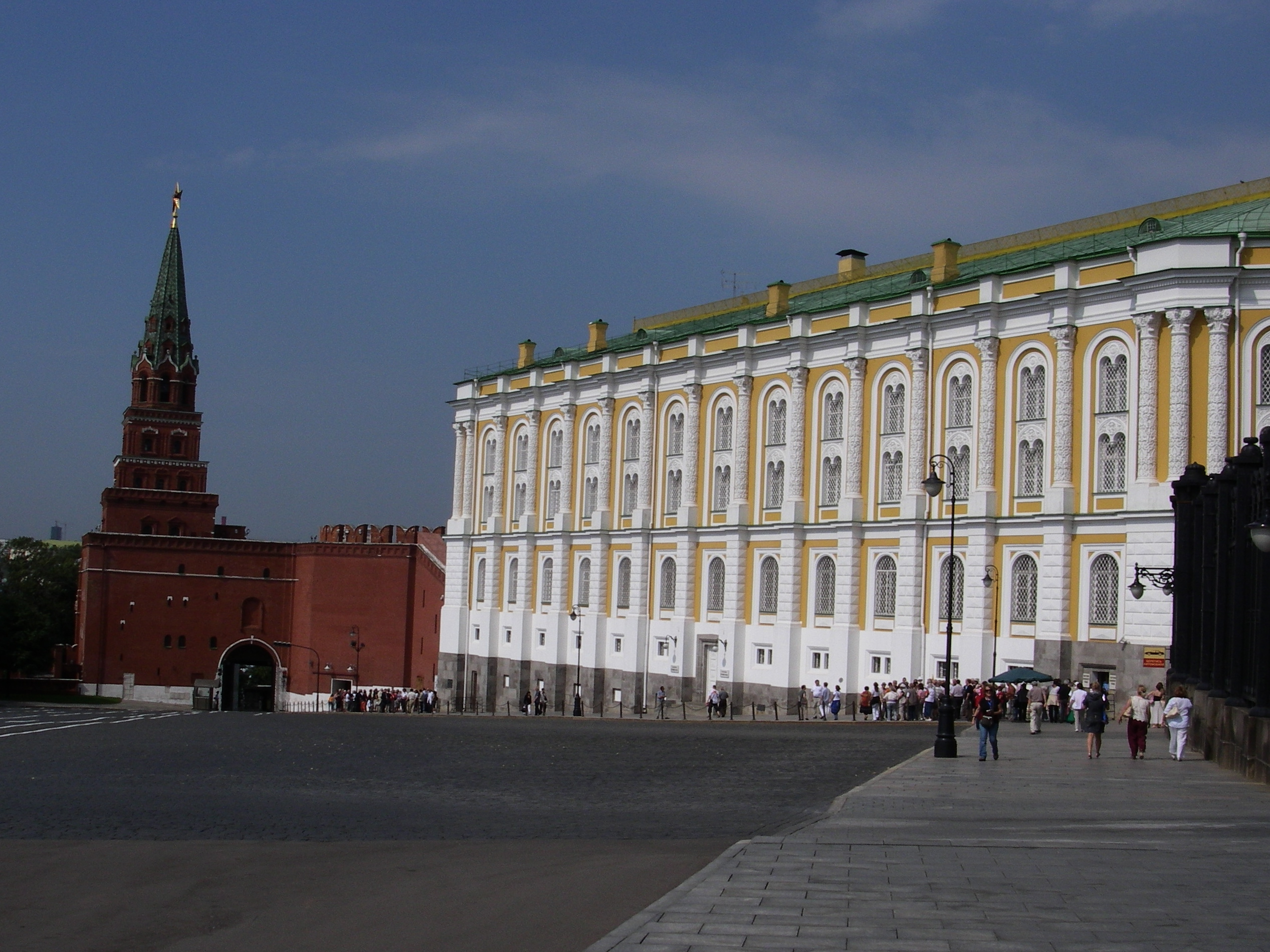 Оръжейната палата.